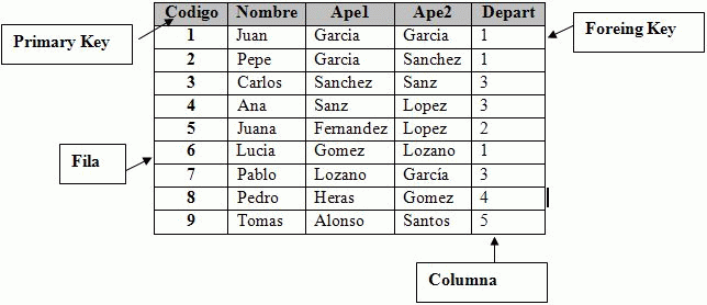 Relación con etiqutado de componentes